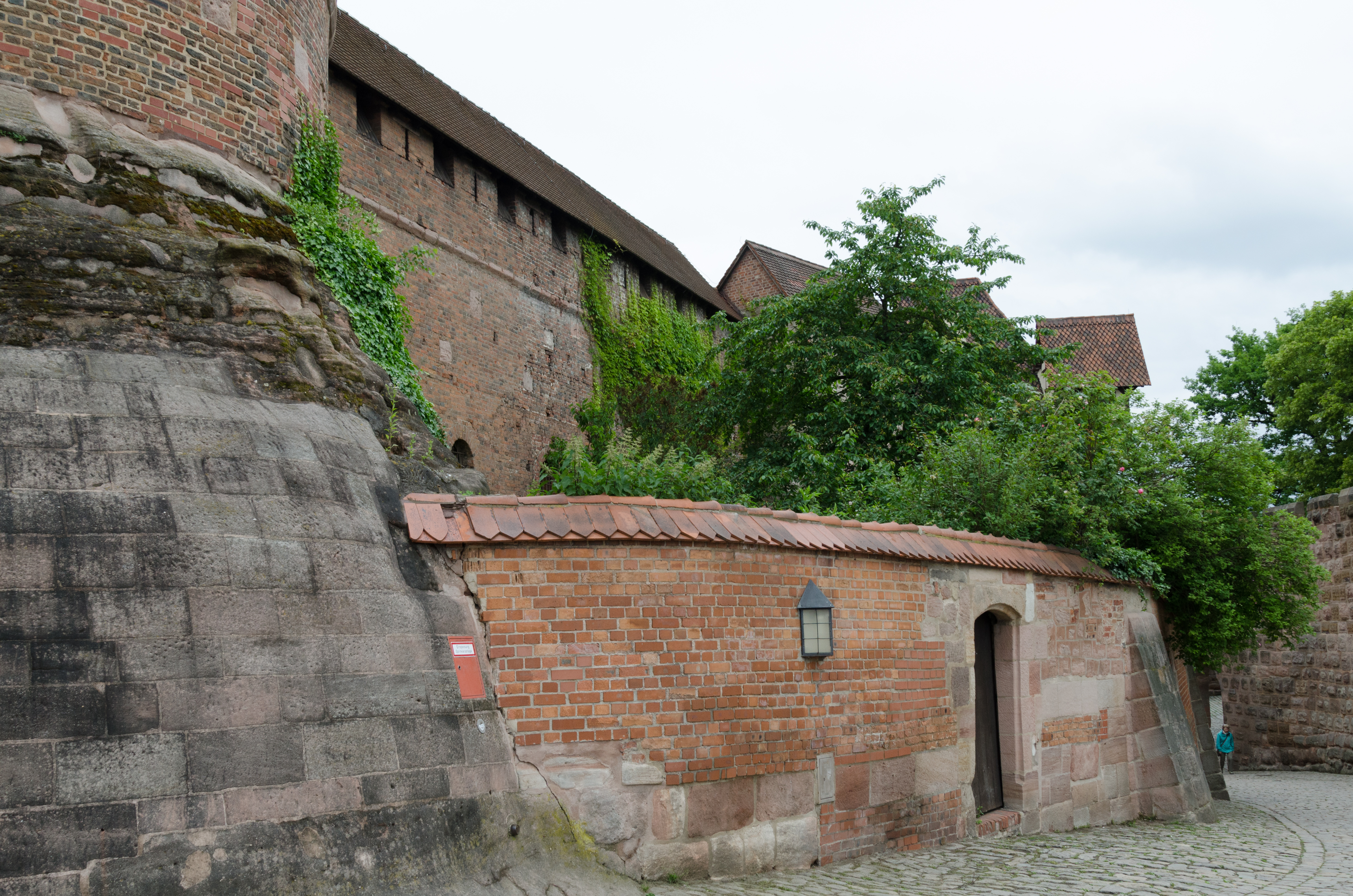 Nürnberg, Burg, Heimlicher Wächtergang, Freiung